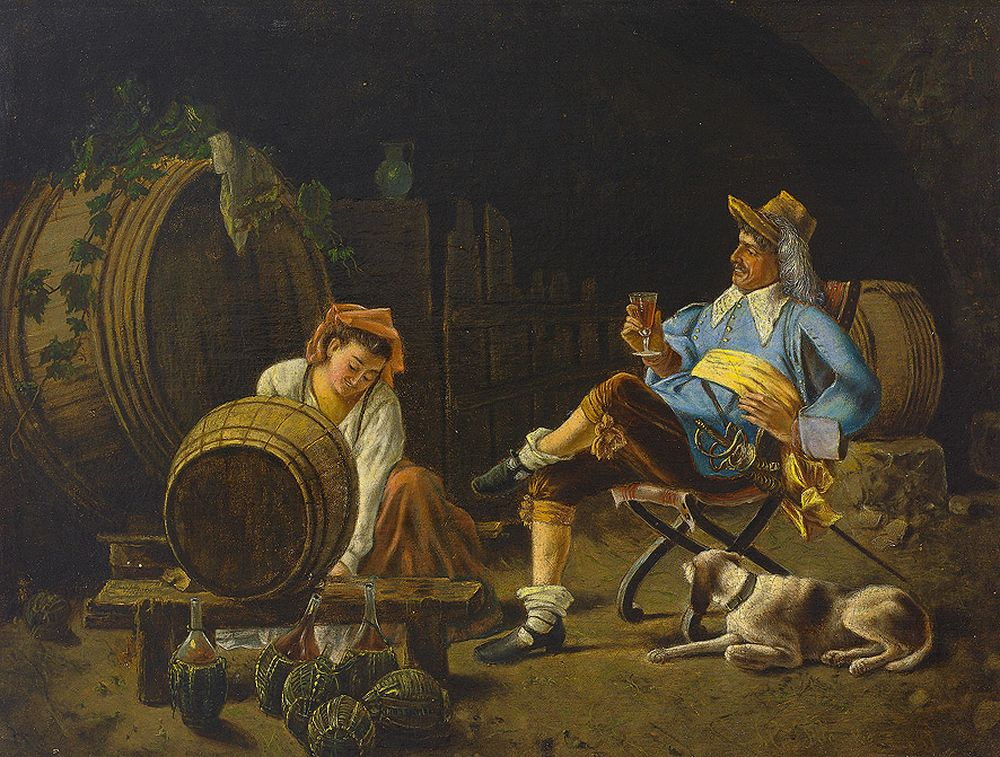 Blick in italienischen Weinkeller. Öl auf Holz. 32 x 42 cm.